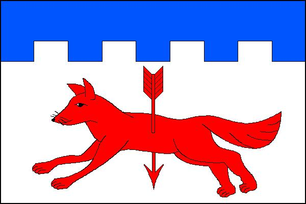 Vlajka města Strážov